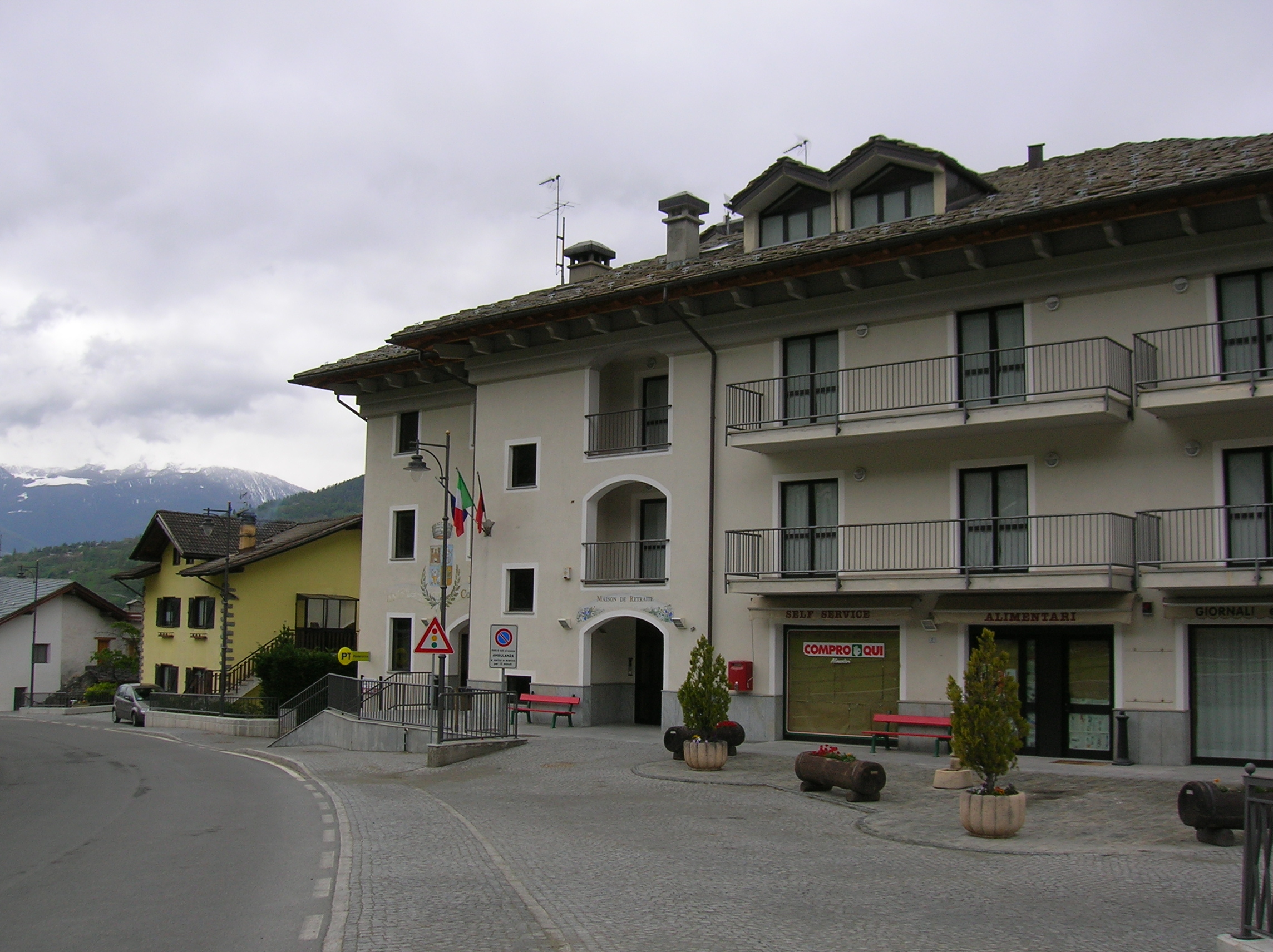 Municipio di Roisan, Valle d'Aosta, Italia.